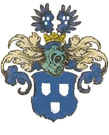 Wappen Grandwiler